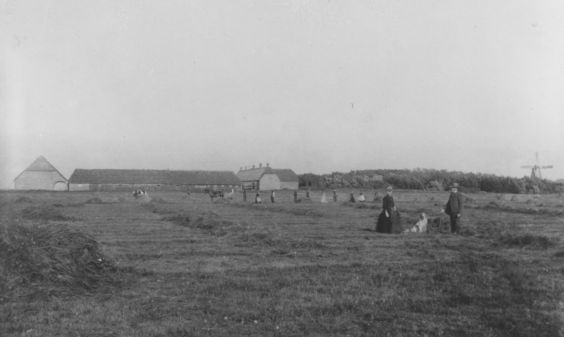 Vinderupgård set fra Vinderup Vold